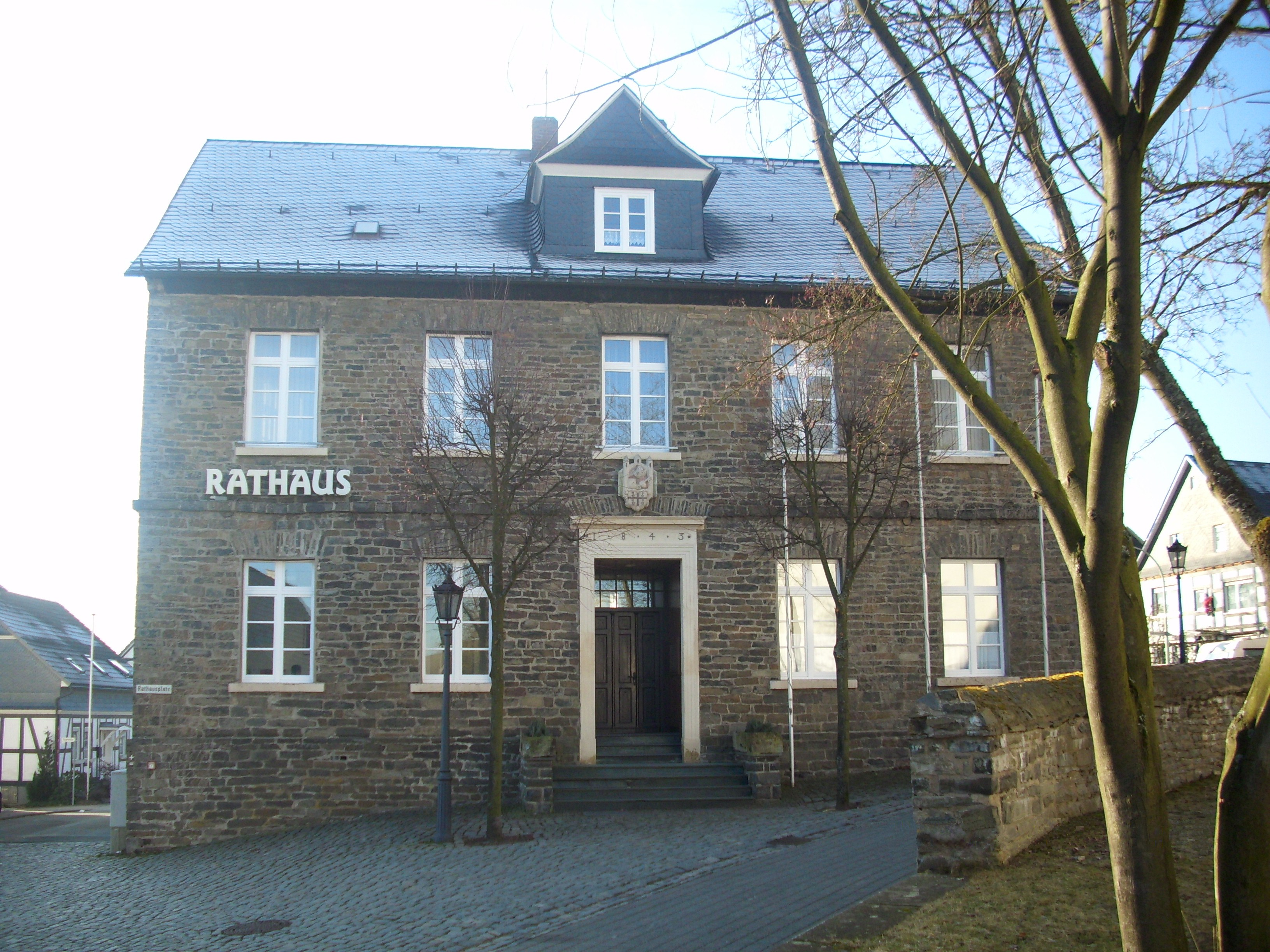 Rathaus von Hallenberg (Hochsauerlandkreis)